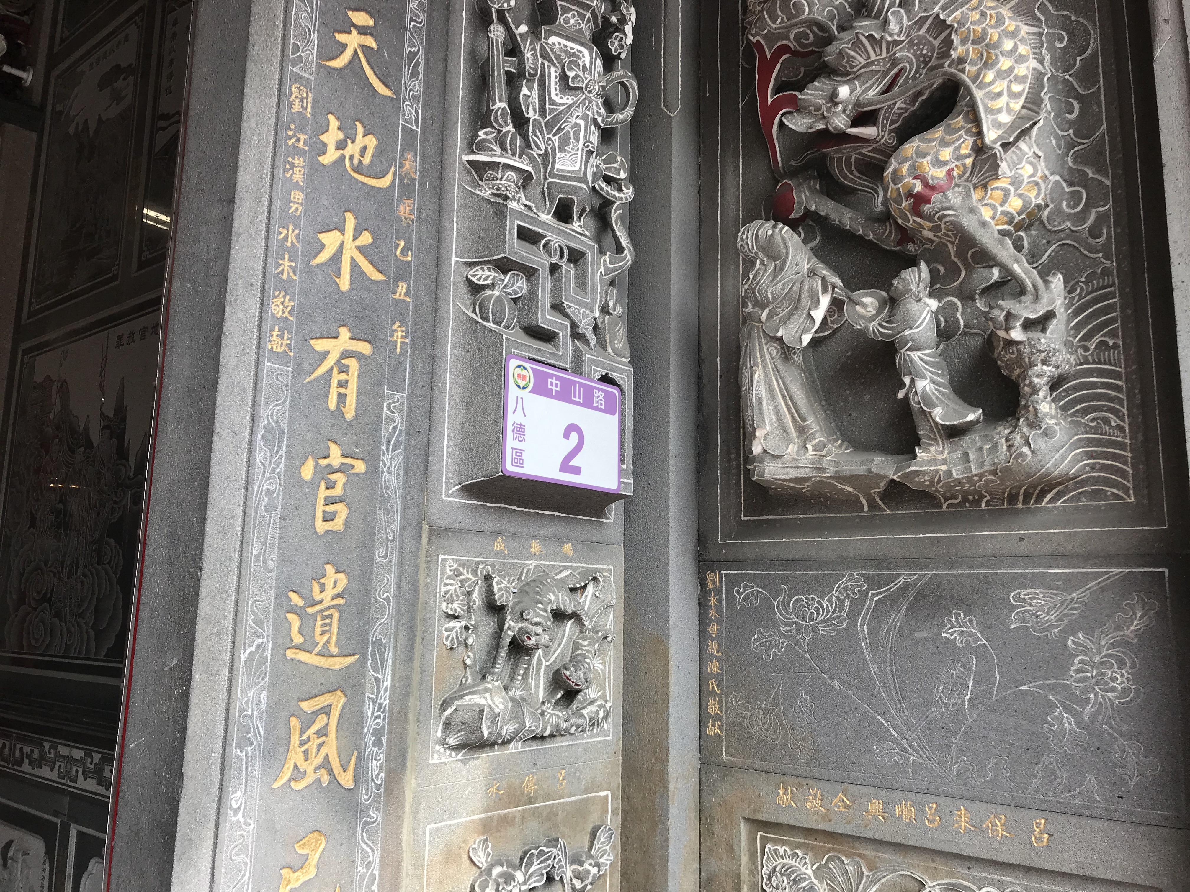 中文（台灣）: 八德三元宮門牌